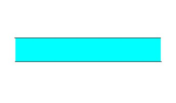 Esou gett e Floss oder eng Baach op enger Landkaart duergestallt.